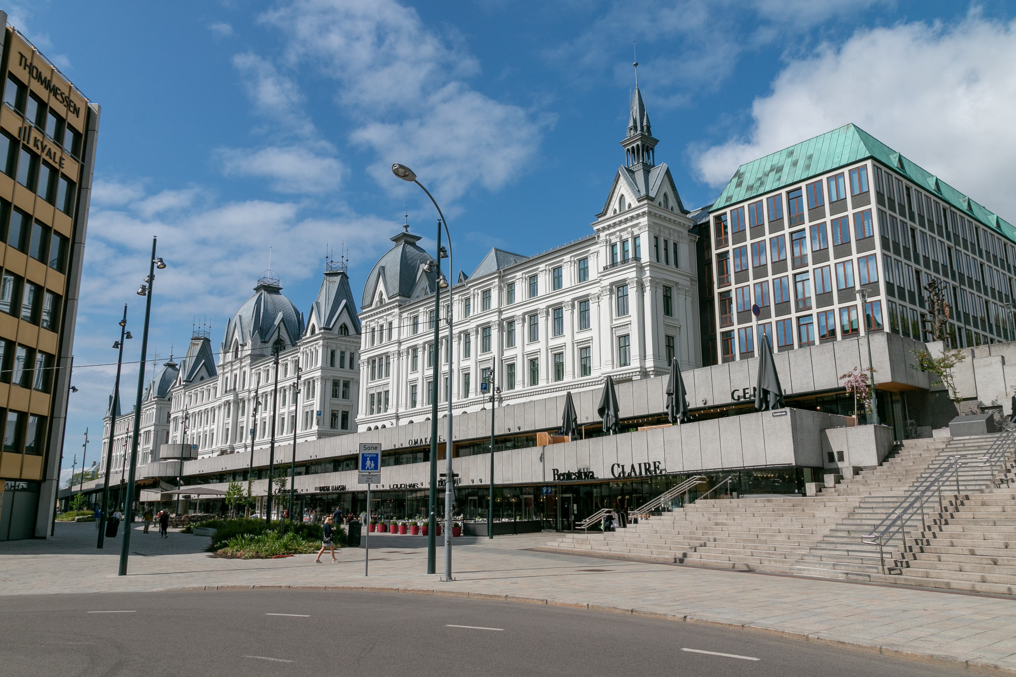 Kontrasterende arkitektur ved Nasjonalteatret stasjon, Oslo.